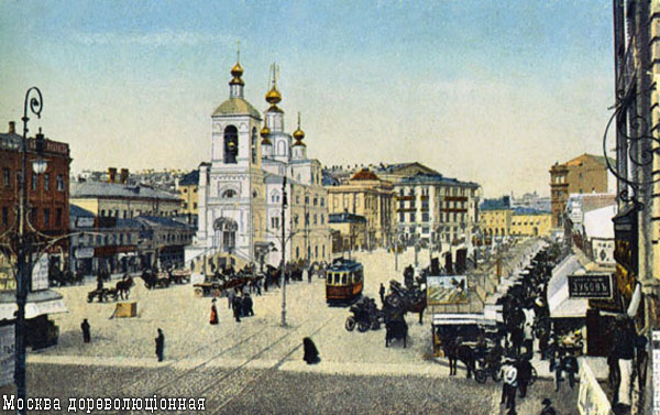 pre-revolutionaty russian postcard of Ohotny ryad and Church of Paraskieva (Охотный ряд и церковь Параскевы Пятницы).